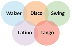 Darstellung der Musikrichtungen, die die Basis für das neue Welttanzprogramm bilden